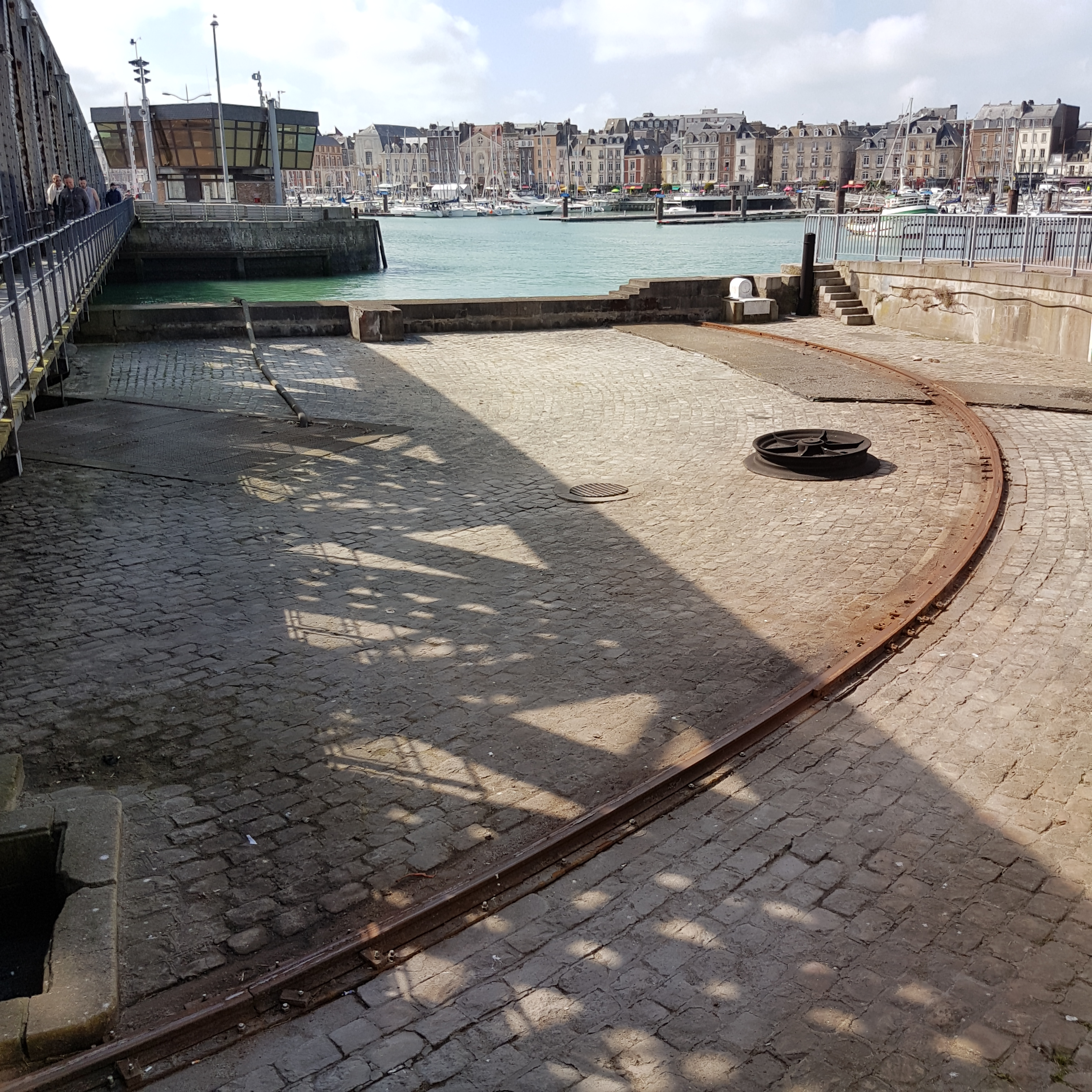 Le rail de guidage du pont Colbert à Dieppe (Seine-Maritime) en avril 2017.